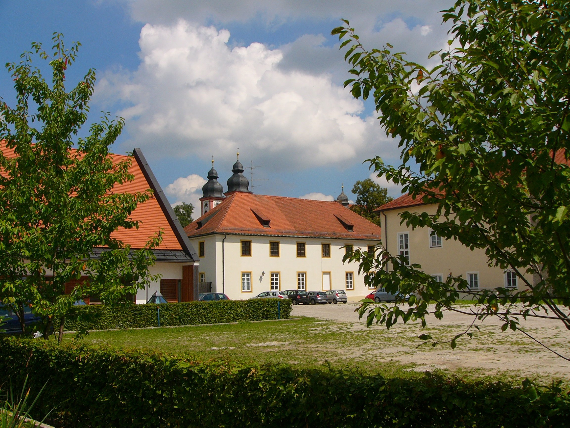 Das Kloster der Franziskanerinnen (Au am Inn)This is a photograph of an architectural monument.